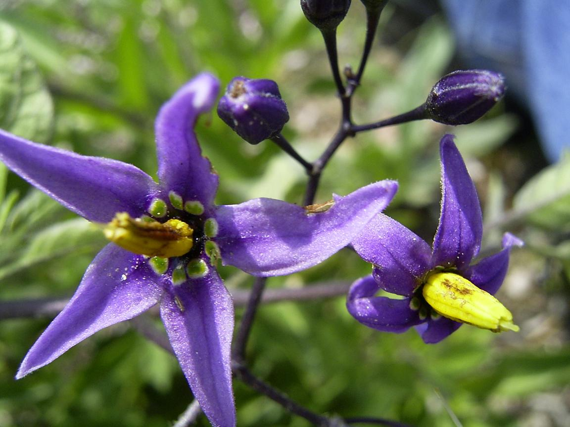 duinen bij wassenaar, augustus nl:2004